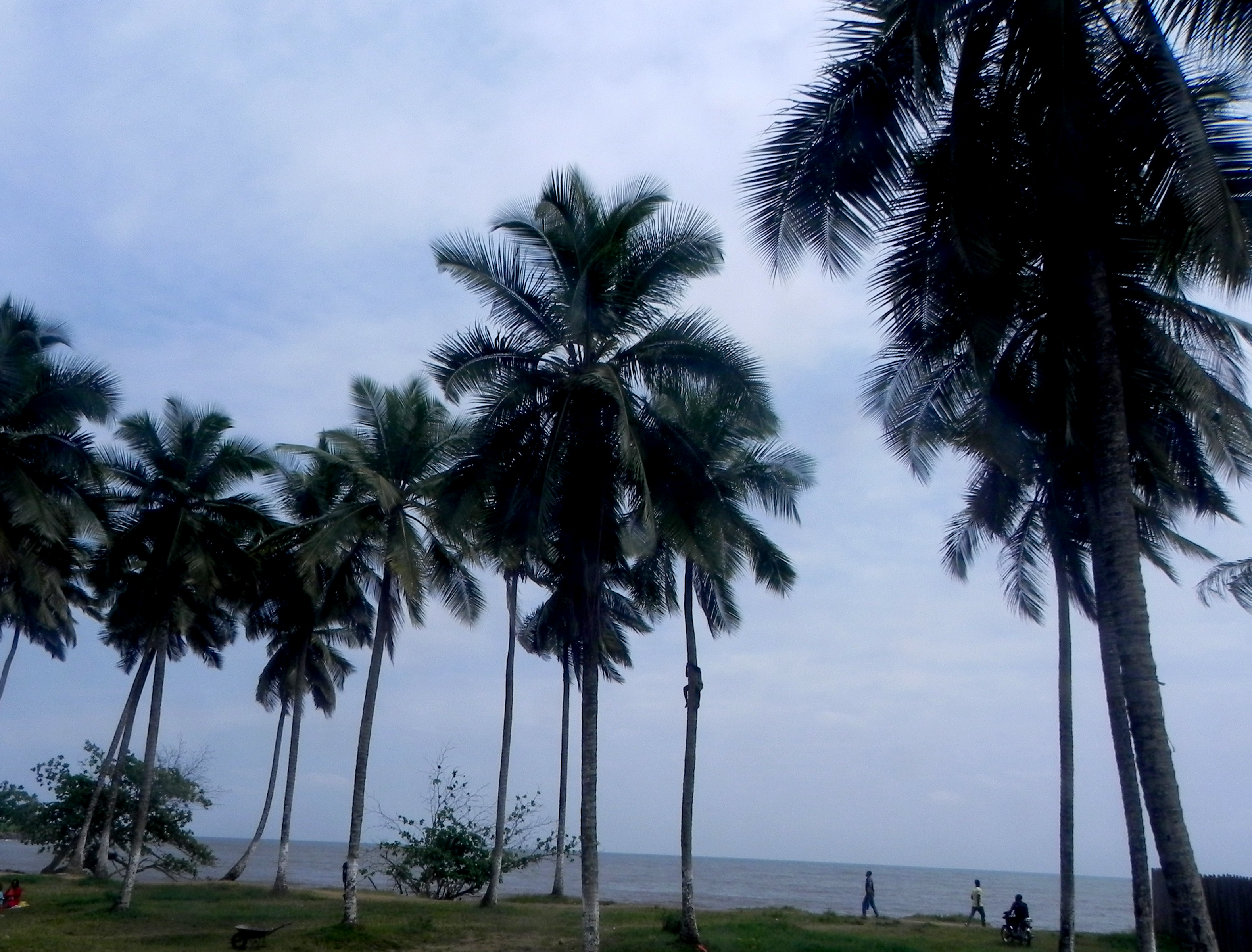 La plage de Kribi